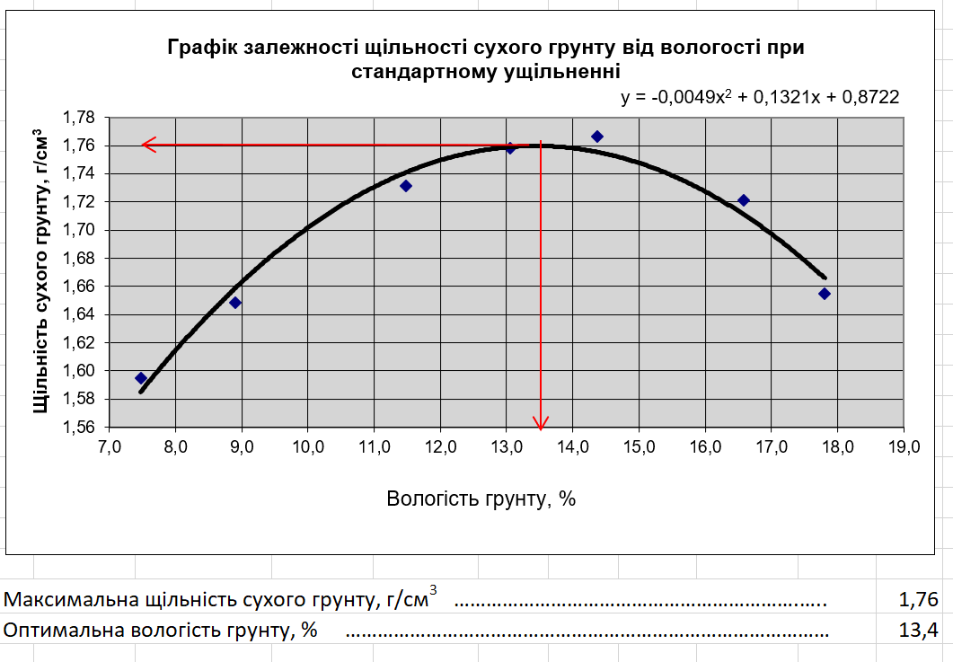 Зроблено у табличному редакторі Excel.